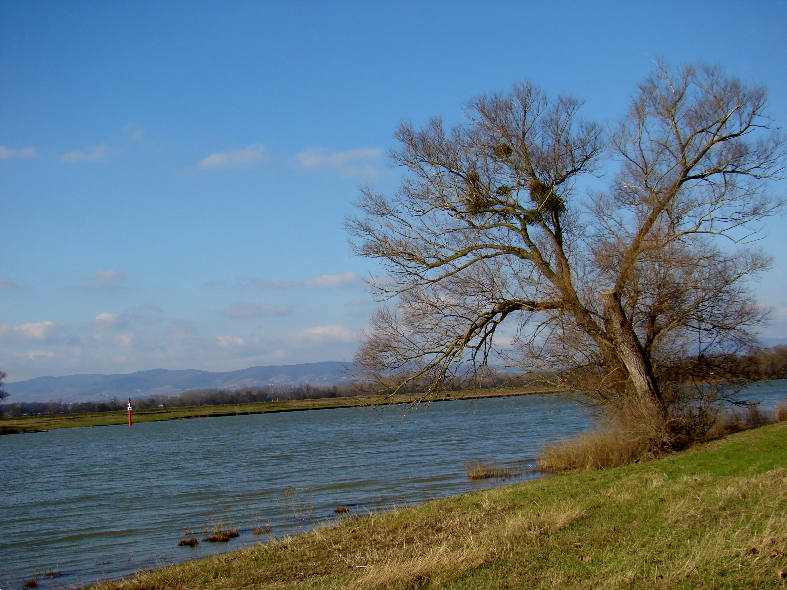 Bord de Saône au niveau de Villefranche sur Saône : rive gauche (Ain)